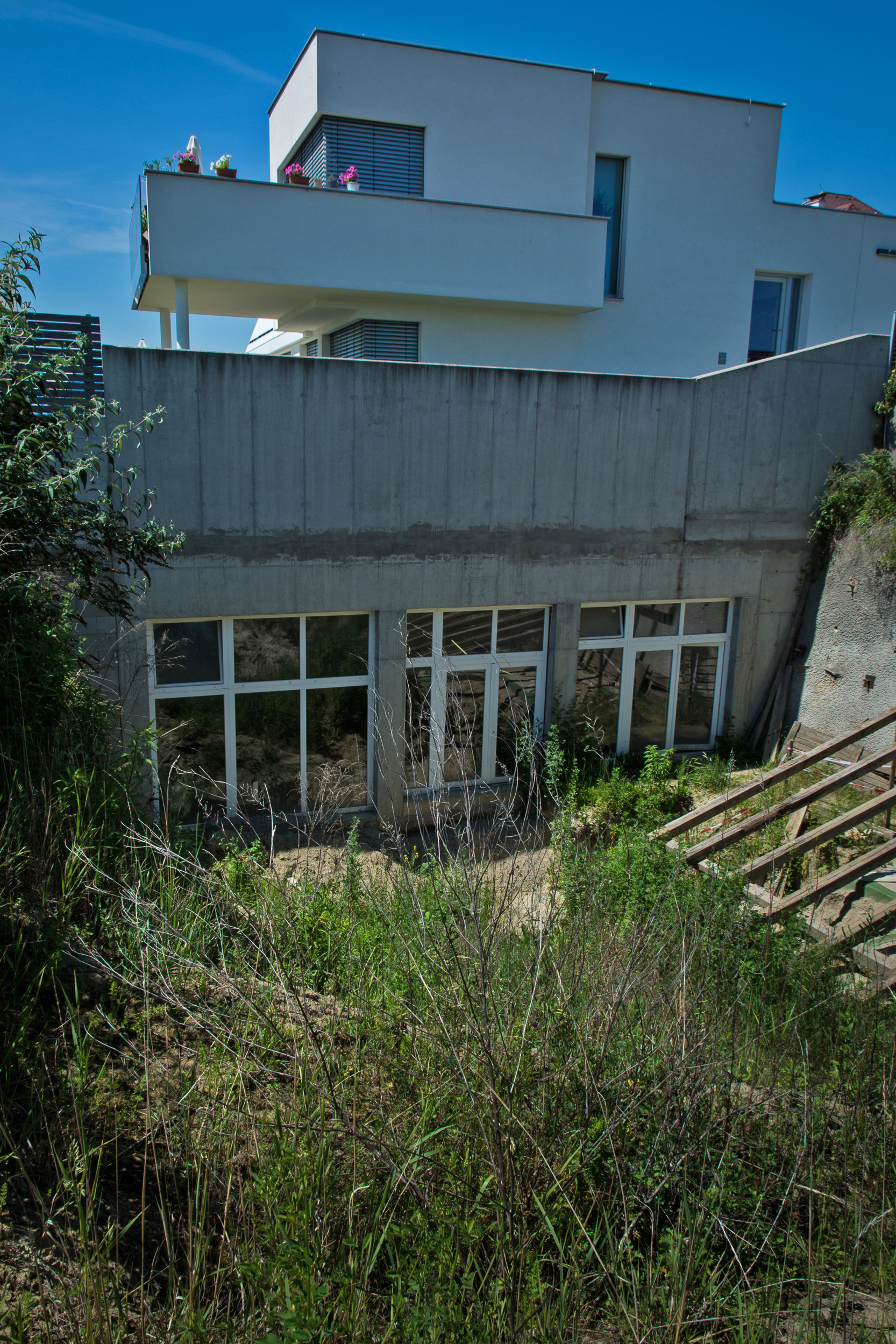 Krems-Wachtberg: Außenansicht des Grabungskellers mit Wohnhaus und der davor liegenden ehemaligen Grabungsfläche.